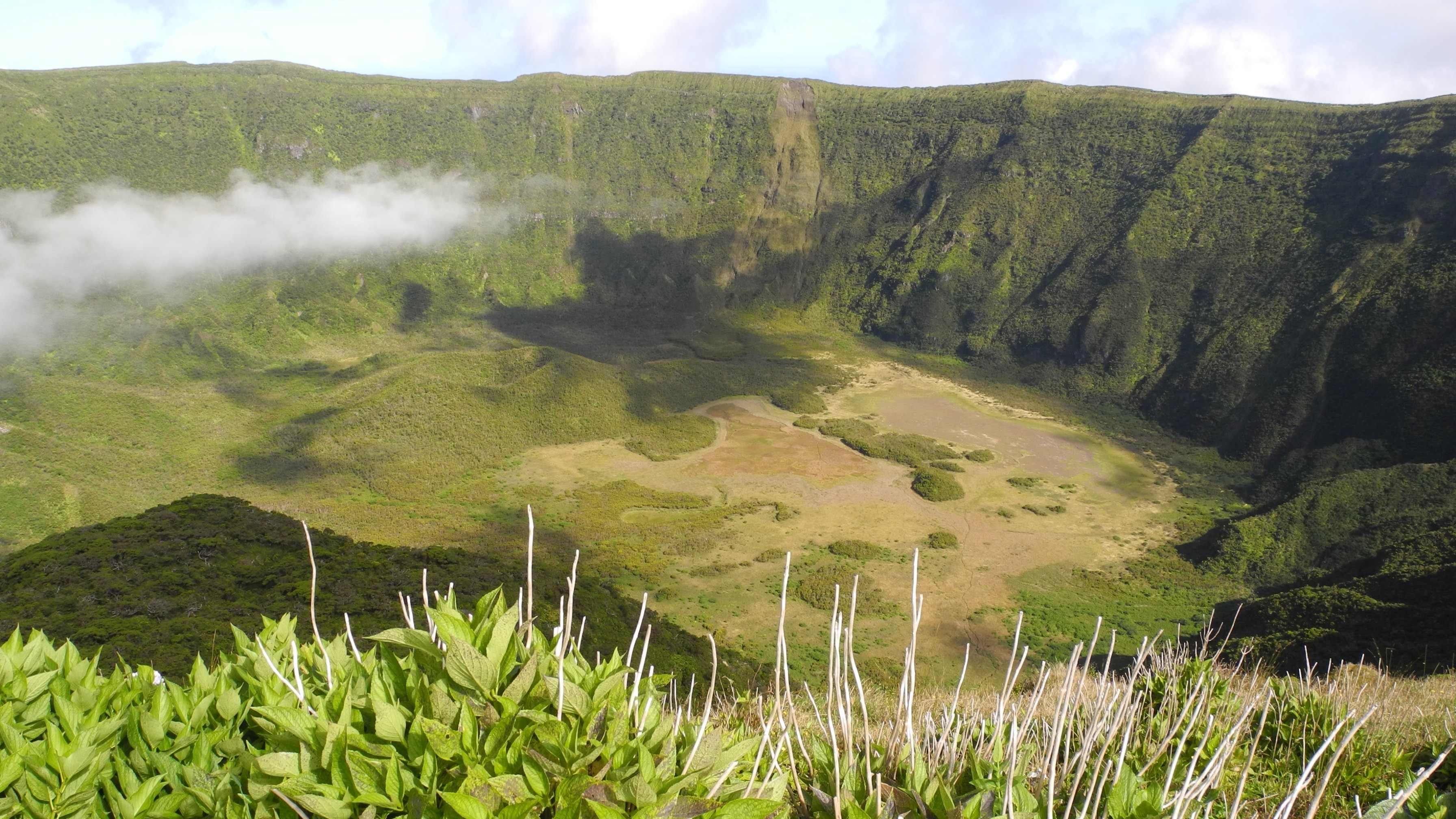 Caldeira Faial ca 580 m.ü.NN. Kesselboden